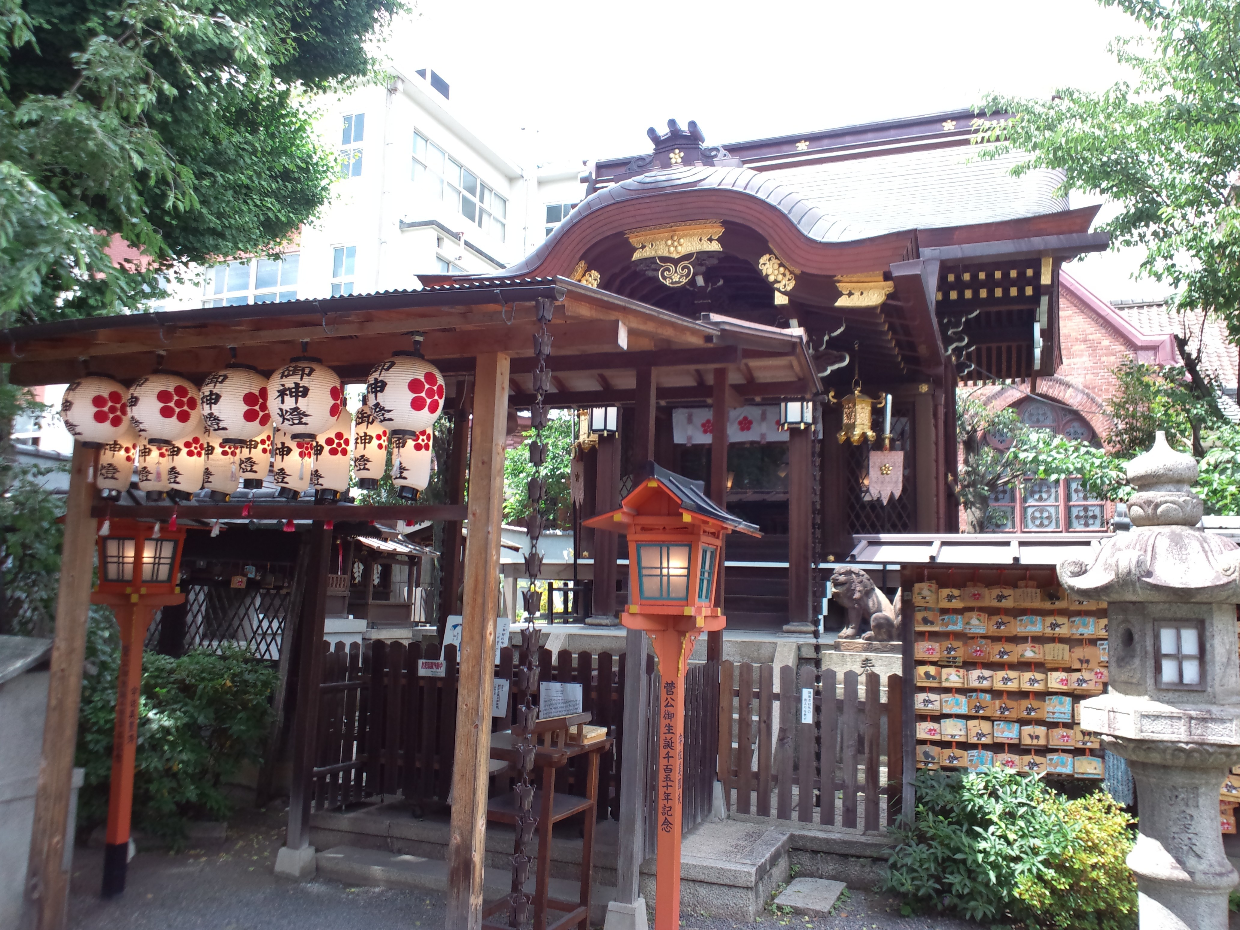 菅原院天満宮 本殿